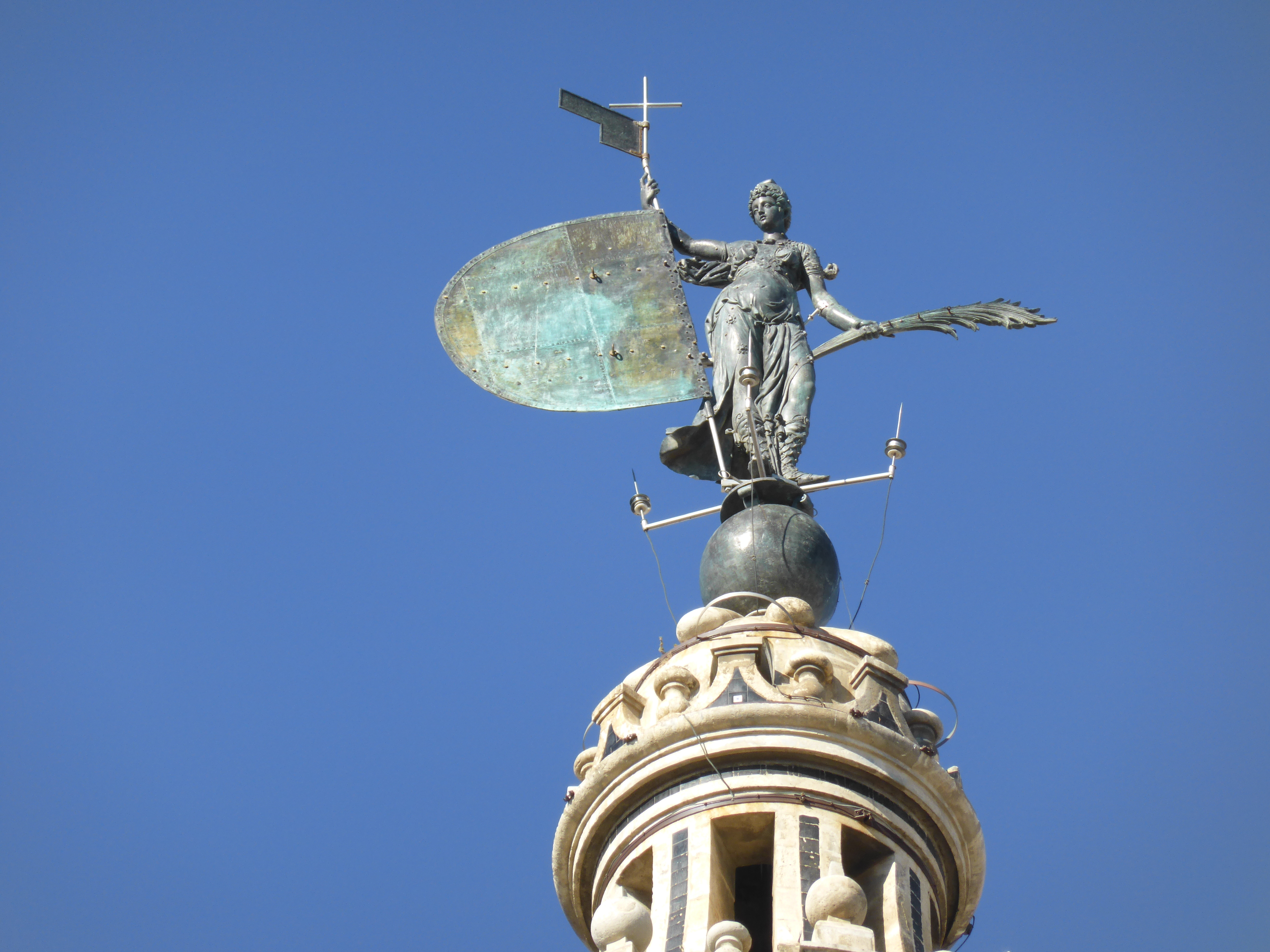 En lo alto de la torre de la Giralda de Sevilla se encuentra esta escultura en bronce, conocida popularmente como el Giraldillo. Representa la Fe. Mide 3 metros y medio de alto. Actúa como una veleta, girando según la dirección del viento. Es la escultura original del año 1568.